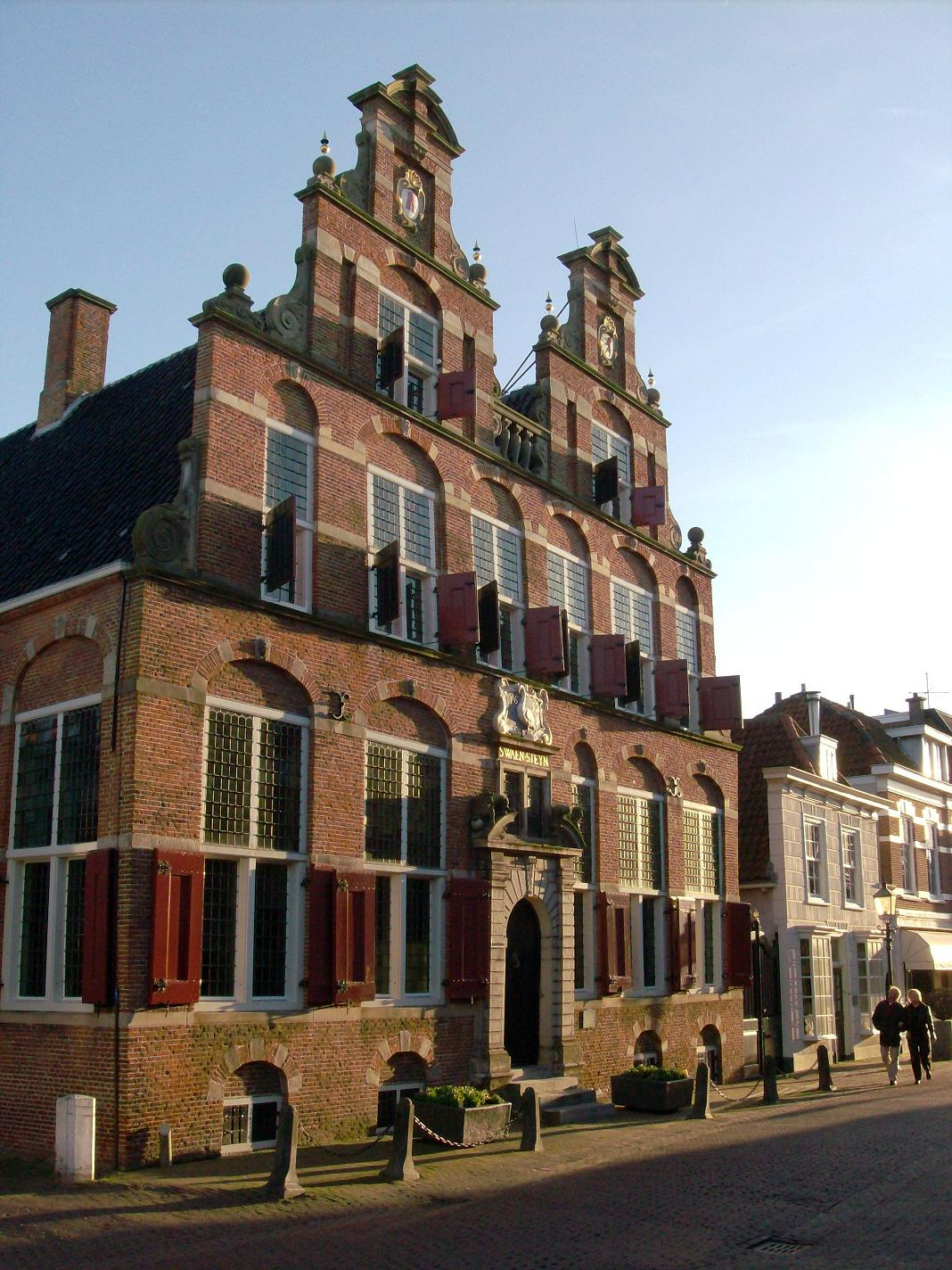 Huize Swaensteyn (1632) is het oude raadhuis van Leidschendam-Voorburg, Nederland. House Swaensteyn (1632) is the old Town Hall of Voorburg, Netherlands.jpg